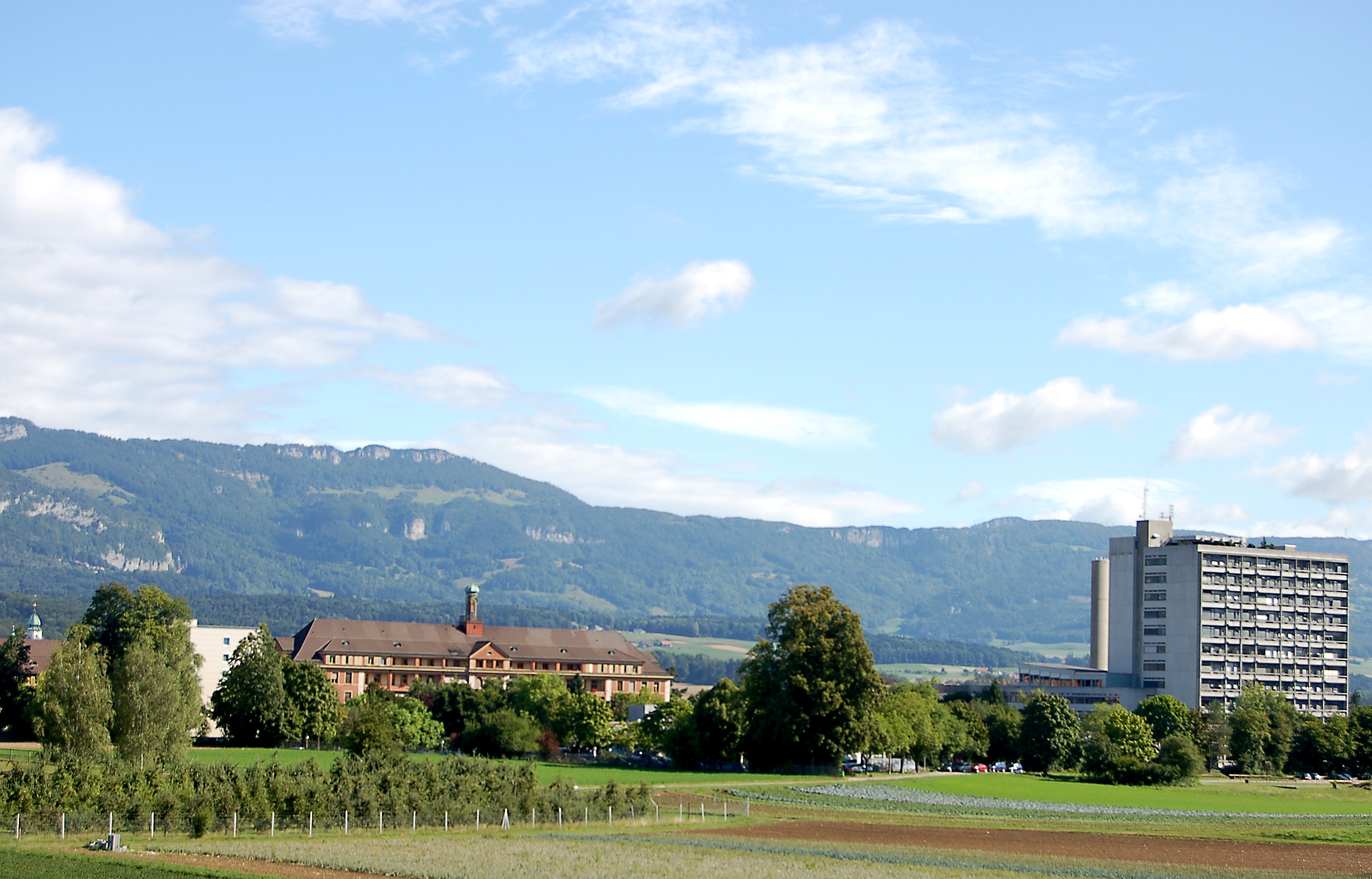 Spital Solothun